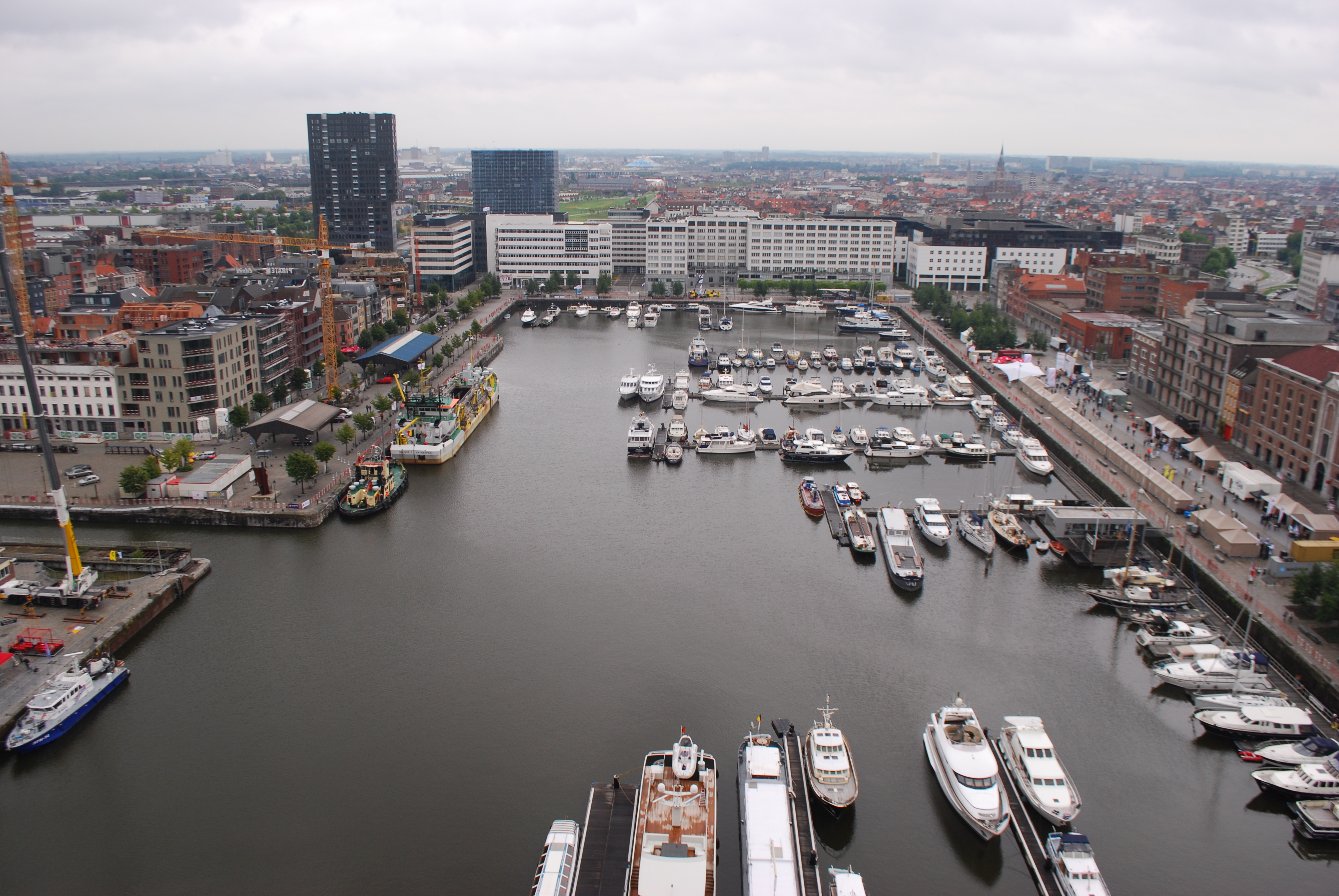 Vue sur le Willemdok à Anvers.